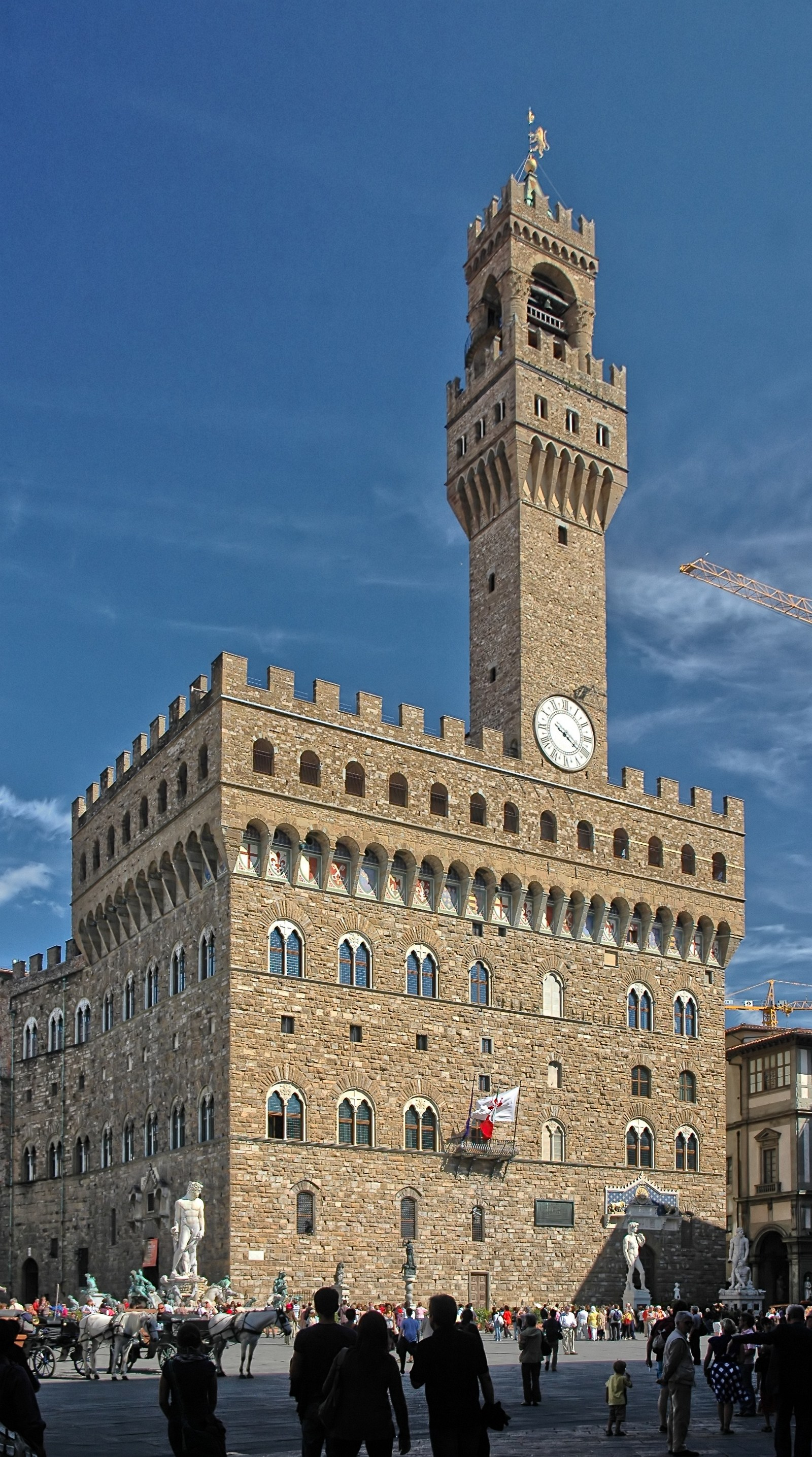 Palazzo Veechio in Florence/Italy